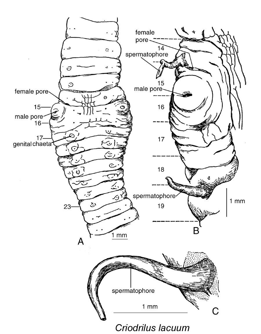 Criodrilus lacuum